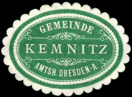 Sealing stamp Title: Gemeinde Kemnitz - Amtshauptmannschaft Dresden-Altstadt Description: grün, weiß, geprägt Place: Kemnitz size: 3x4 cm